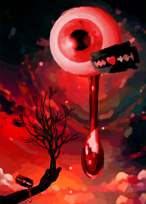 From the book "The burning sanctuary" - Hernan Ergueta